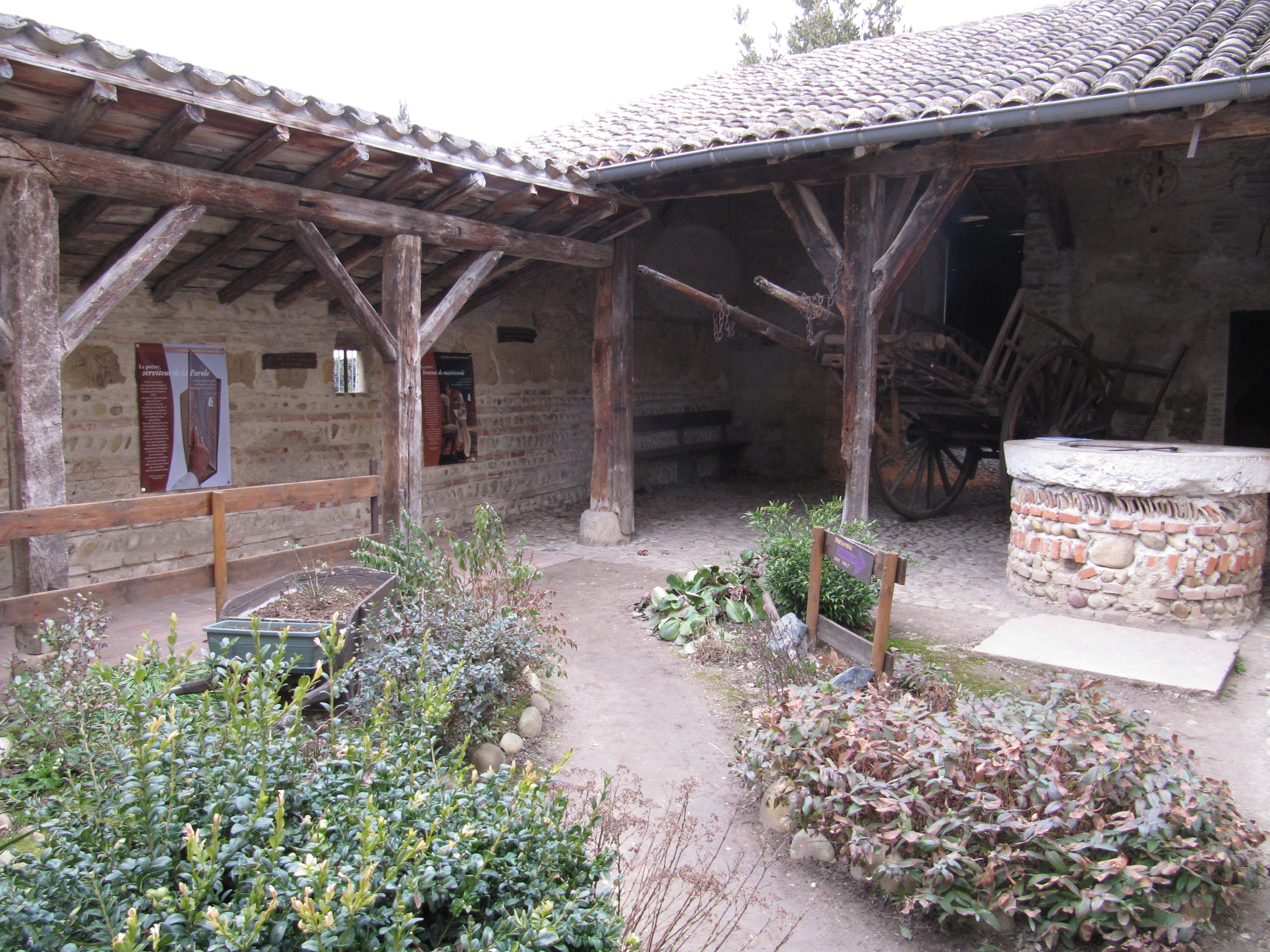 La Maison natale du Curé d'Ars